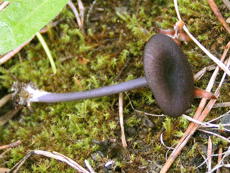 Entoloma mougeotii - Subgenus Leptonia - Entolomaceae